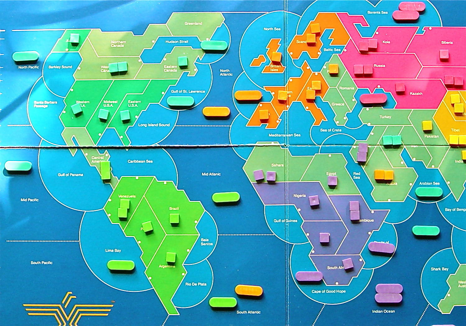 Game